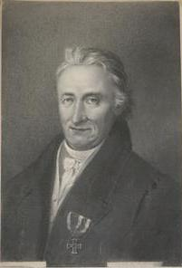 Eckstein Ferenc orvosdoktor, császári és királyi tanácsos, Pest- és Somogy megye táblabírája, egyetemi tanár.